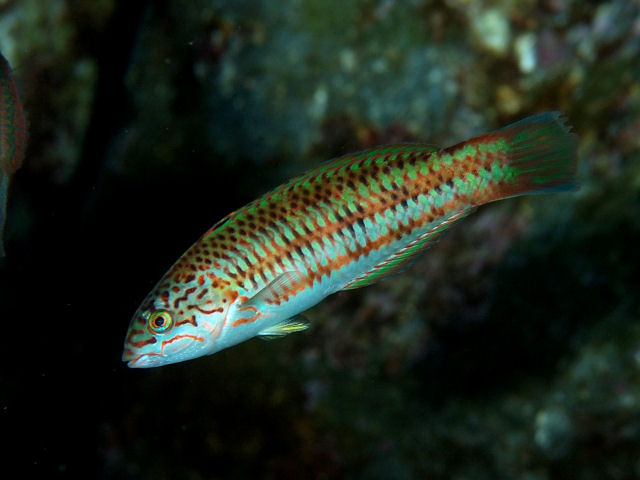 リュウグウベラ Thalassoma trilobatum